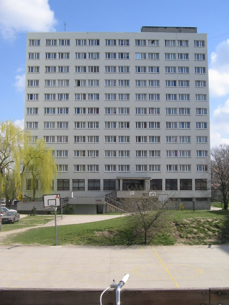 Wygląd budynków